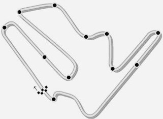 plattegrond circuit Motegi